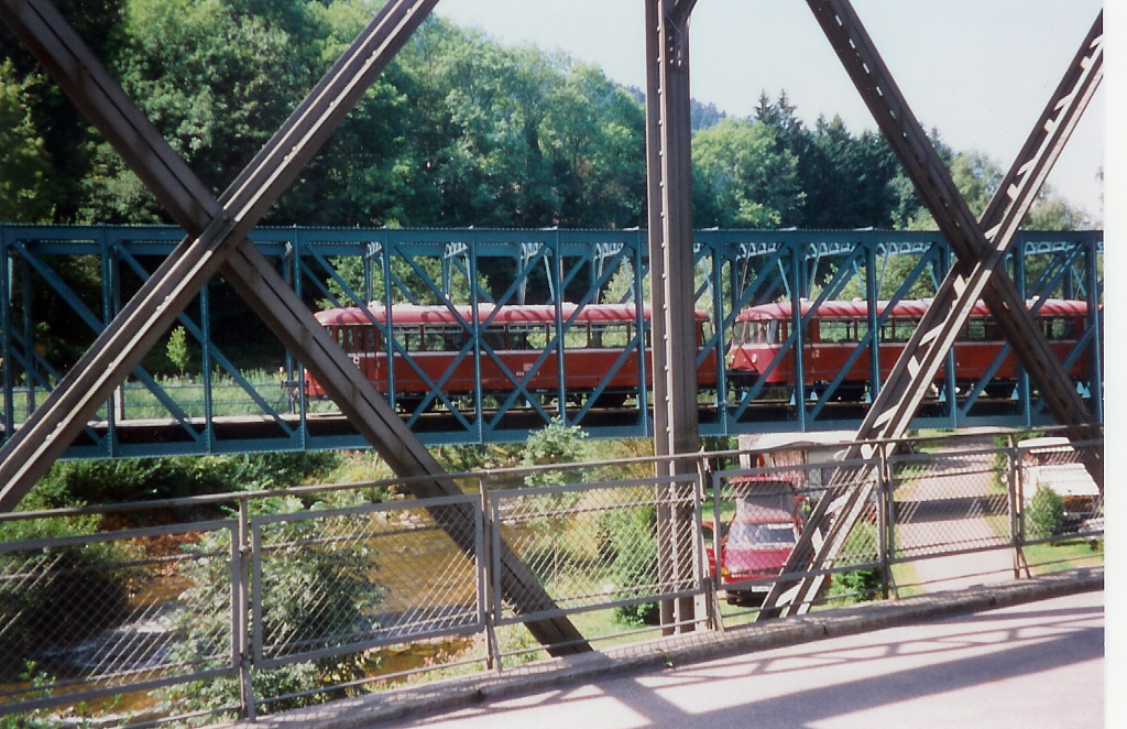 Denkmal Bahnhofsbruecke in Schiltach Germany